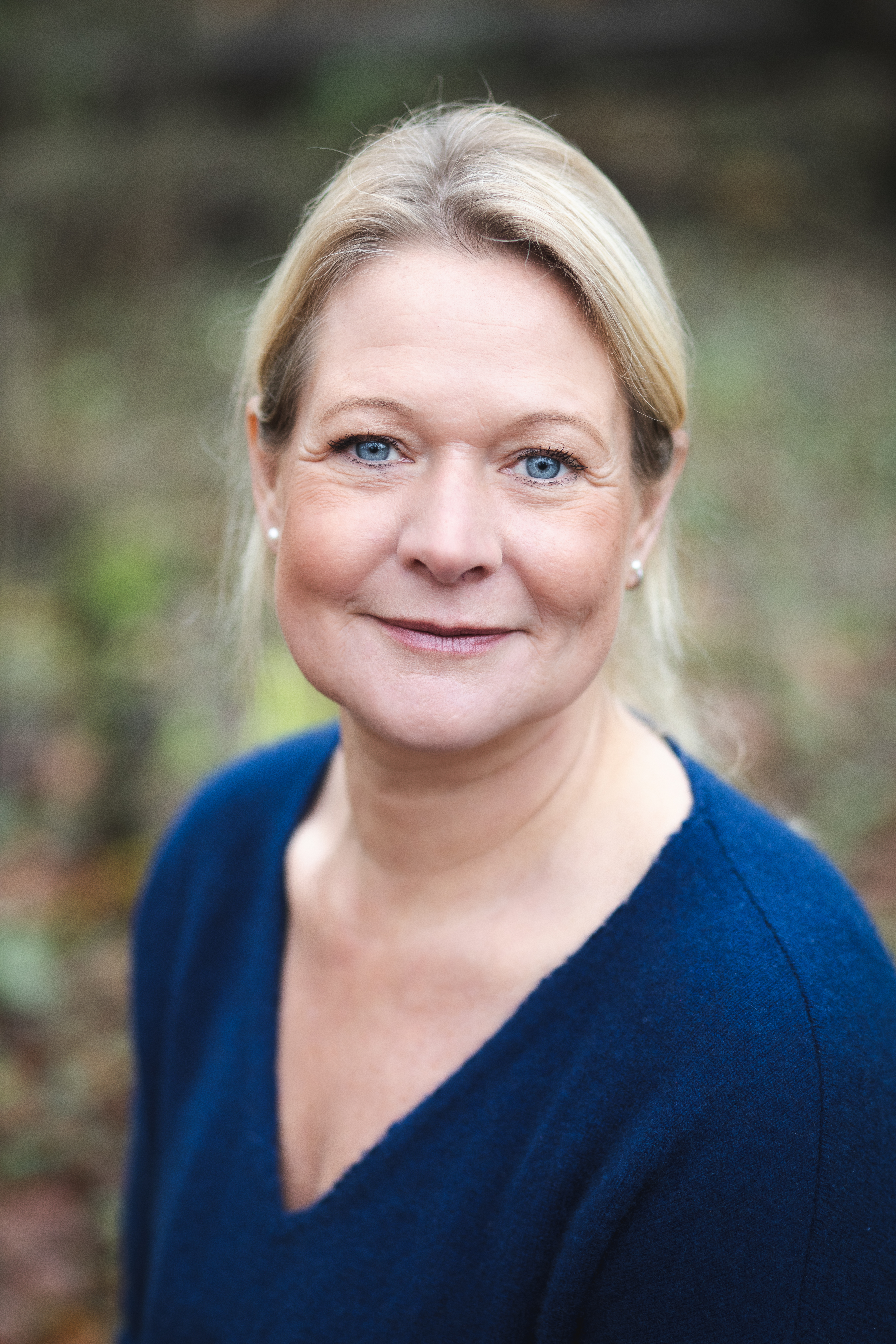 Autorin Kathrin Hanke schreibt vor allem Krimis. (c) Foto: Kirsten Köhler